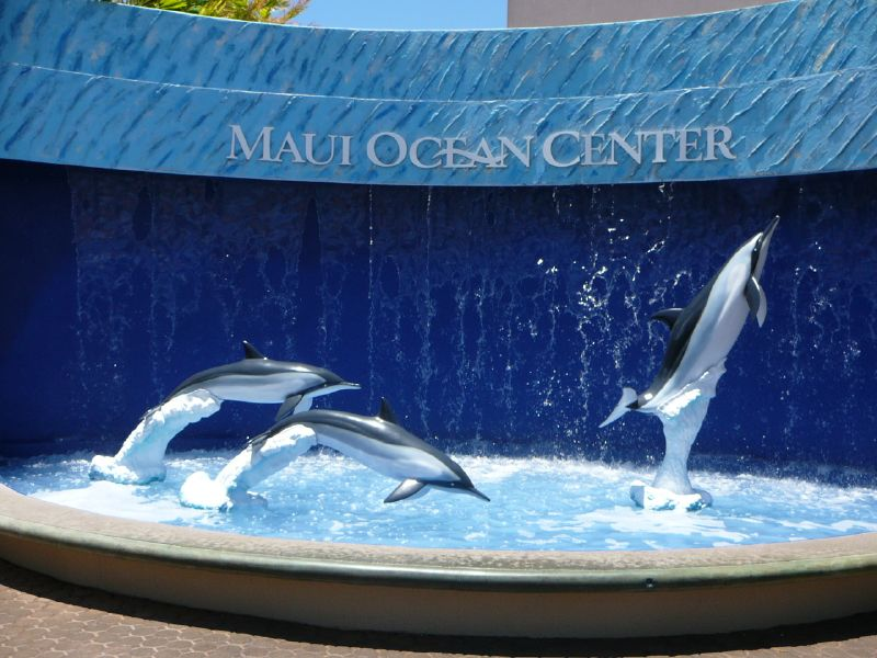 Maui Ocean Center